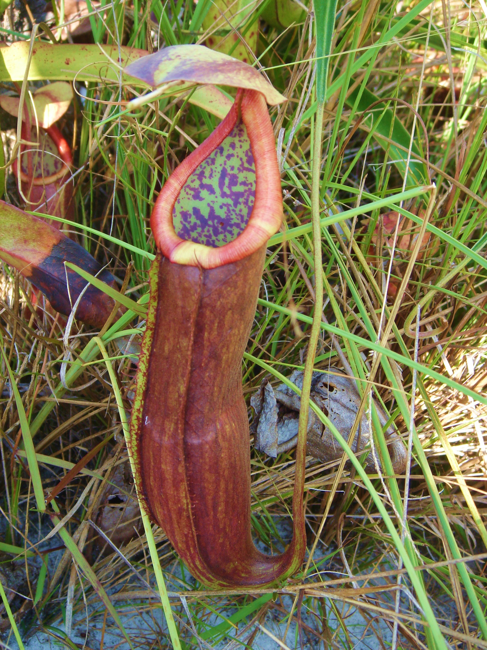 Nepenthes kongkandana